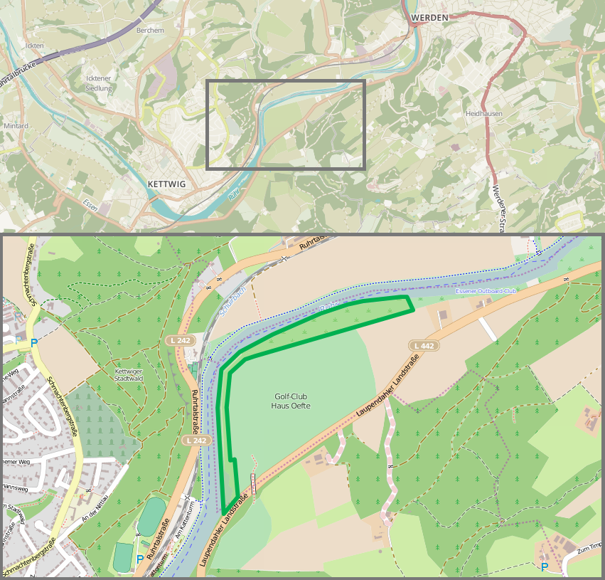 Naturschutzgebiet E-009: Ruhruferstreifen am Golfplatz Oefte (Karte)